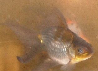 seibungyo